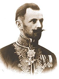 Доктор Бошко Чолак-Антич